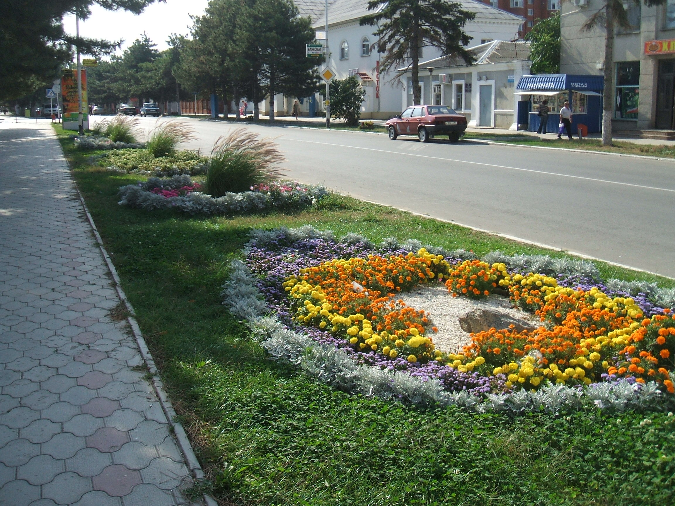 на улице Ленина в г.Темрюке